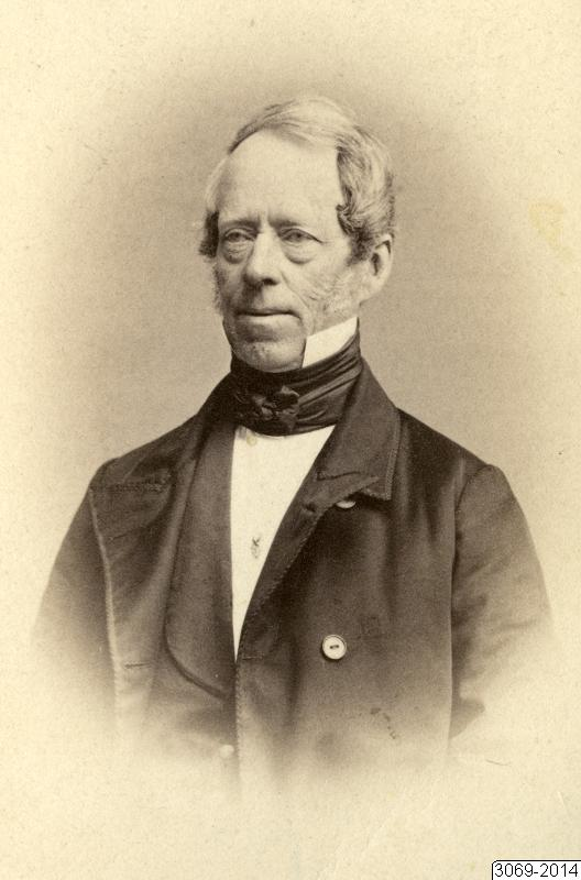 Otto Daniel Krook på 1860-talet.